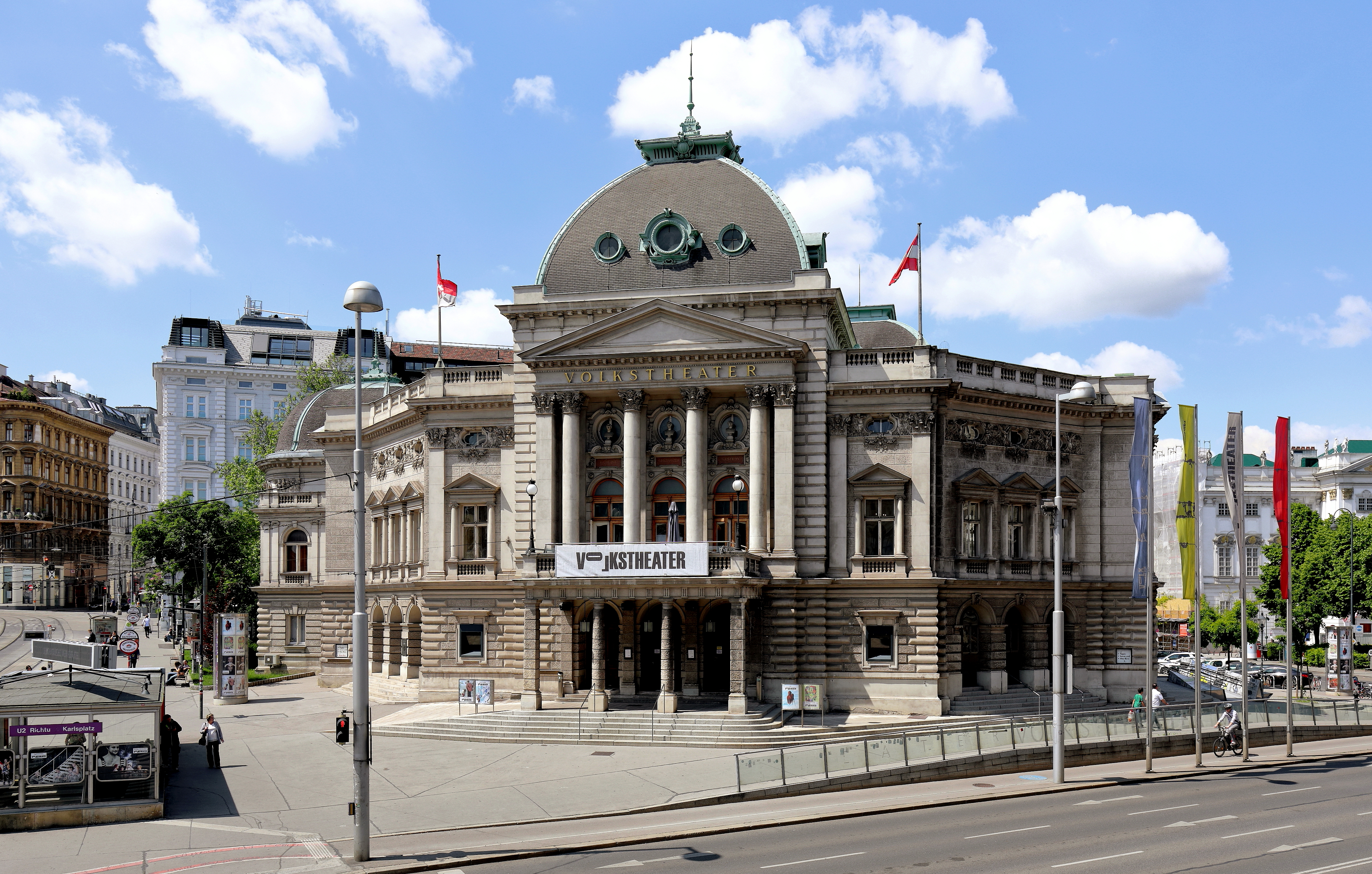 Ostansicht des Volkstheater am Arthur-Schnitzler-Platz im 7. Wiener Gemeindebezirk Neubau.Das Theater wurde ab 1887 nach Plänen von Hermann Helmer und Ferdinand Fellner in Neorenaissanceformen errichtet und am 14. September 1889 mit Ludwig Anzengrubers Schauspiel „Der Fleck auf der Ehr’“ als Deutsches Volkstheater eröffnet. Über dem Hauptportal befinden sich die Büsten von Ferdinand Raimund, Johann Nestroy und Franz Grillparzer. Diese wurde im Zuge der Generalsanierung 1989 angebracht. Ursprünglich gab es welche von Friedrich Schiller, Gotthold Ephraim Lessing und Grillparzer.